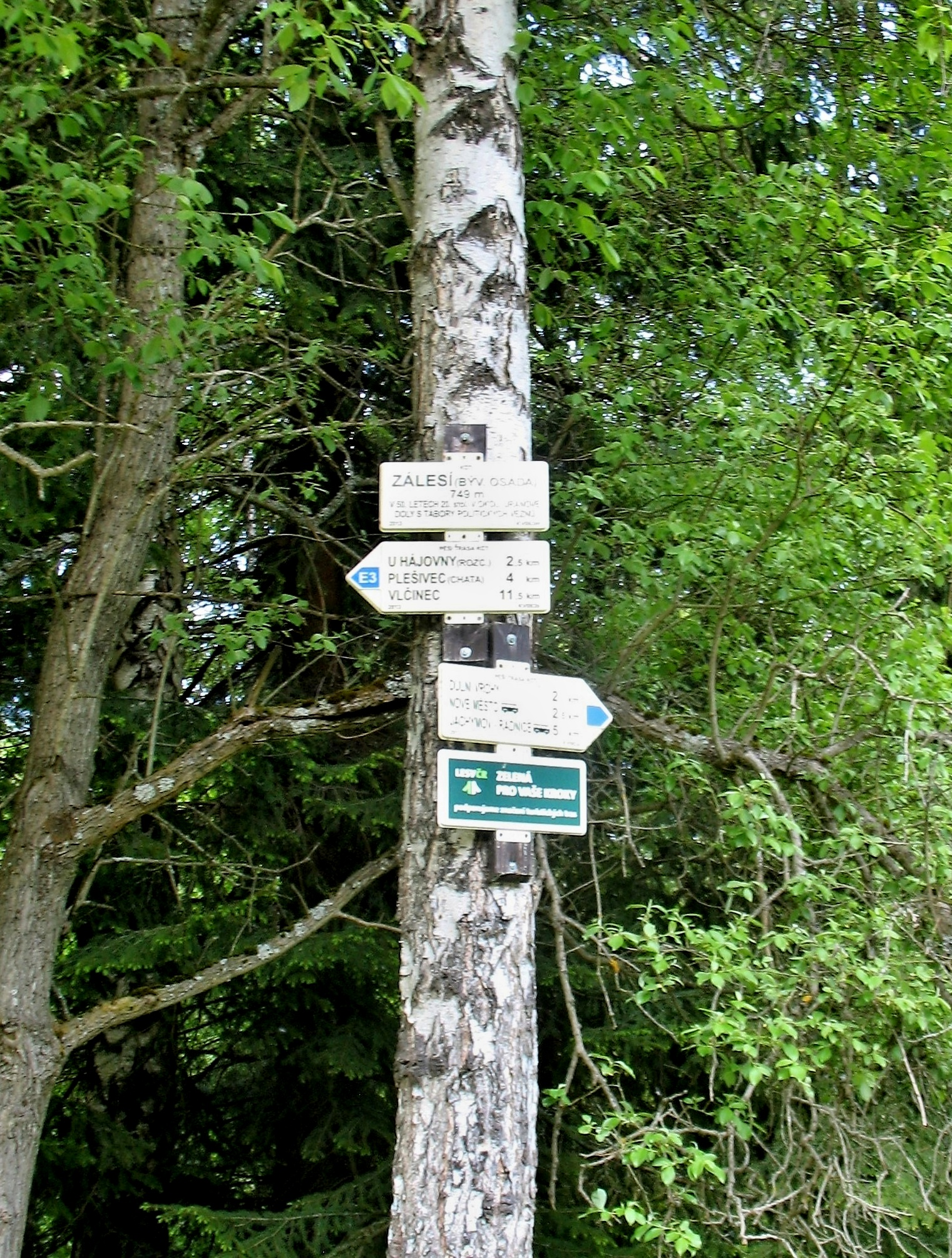 Turistický rozcestník v osadě Zálesí u Jáchymova